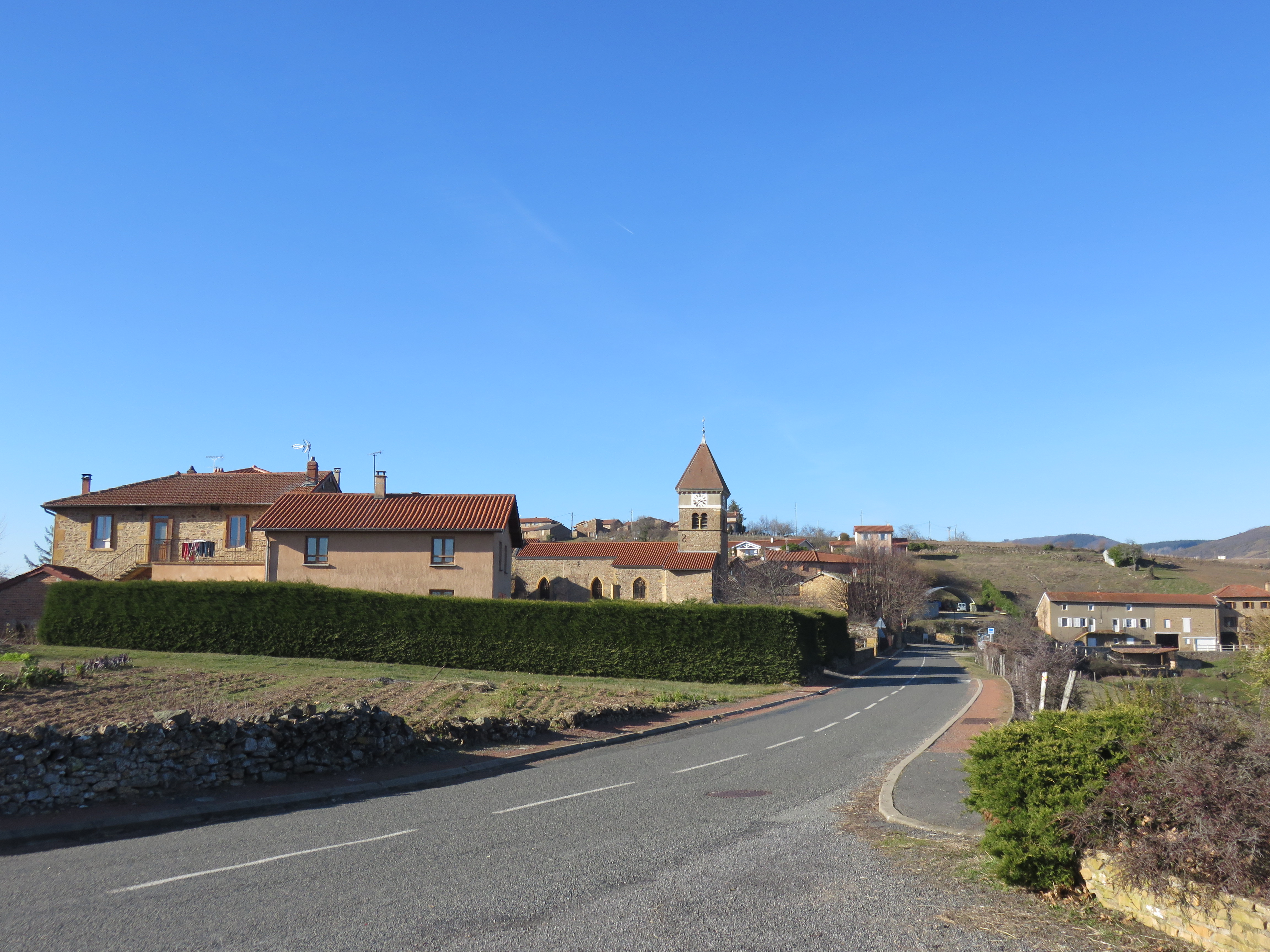 Vue du village de Sainte-Paule (Rhône, France), depuis la route départementale 31.